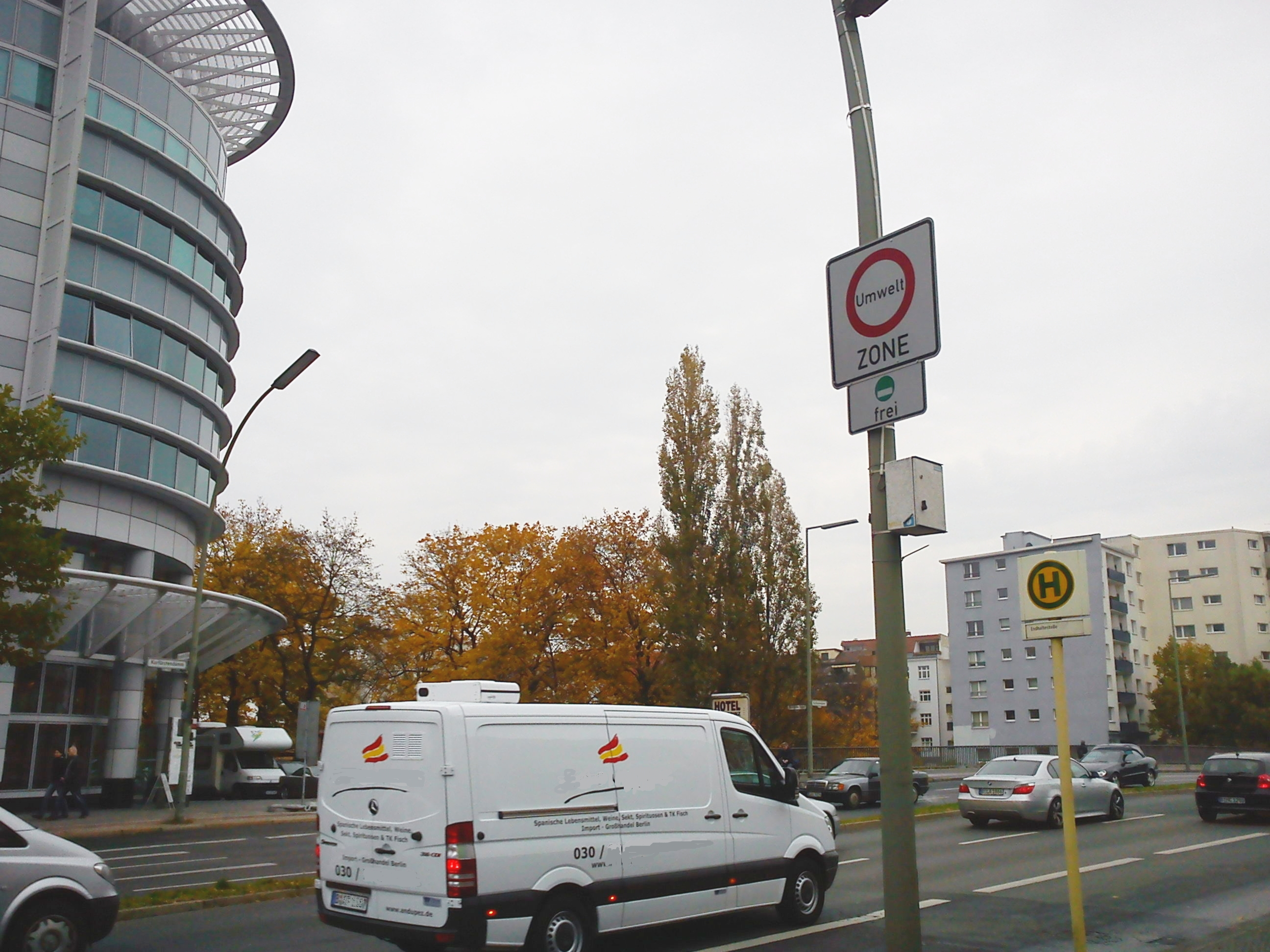 Verkehrsschild zur Umweltzone in Berlin